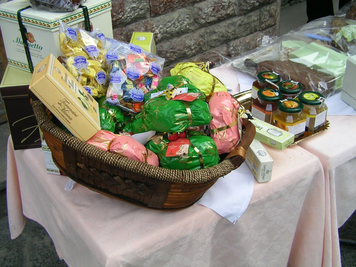 Prodotti tipici delle Madonie (Castelbuono)